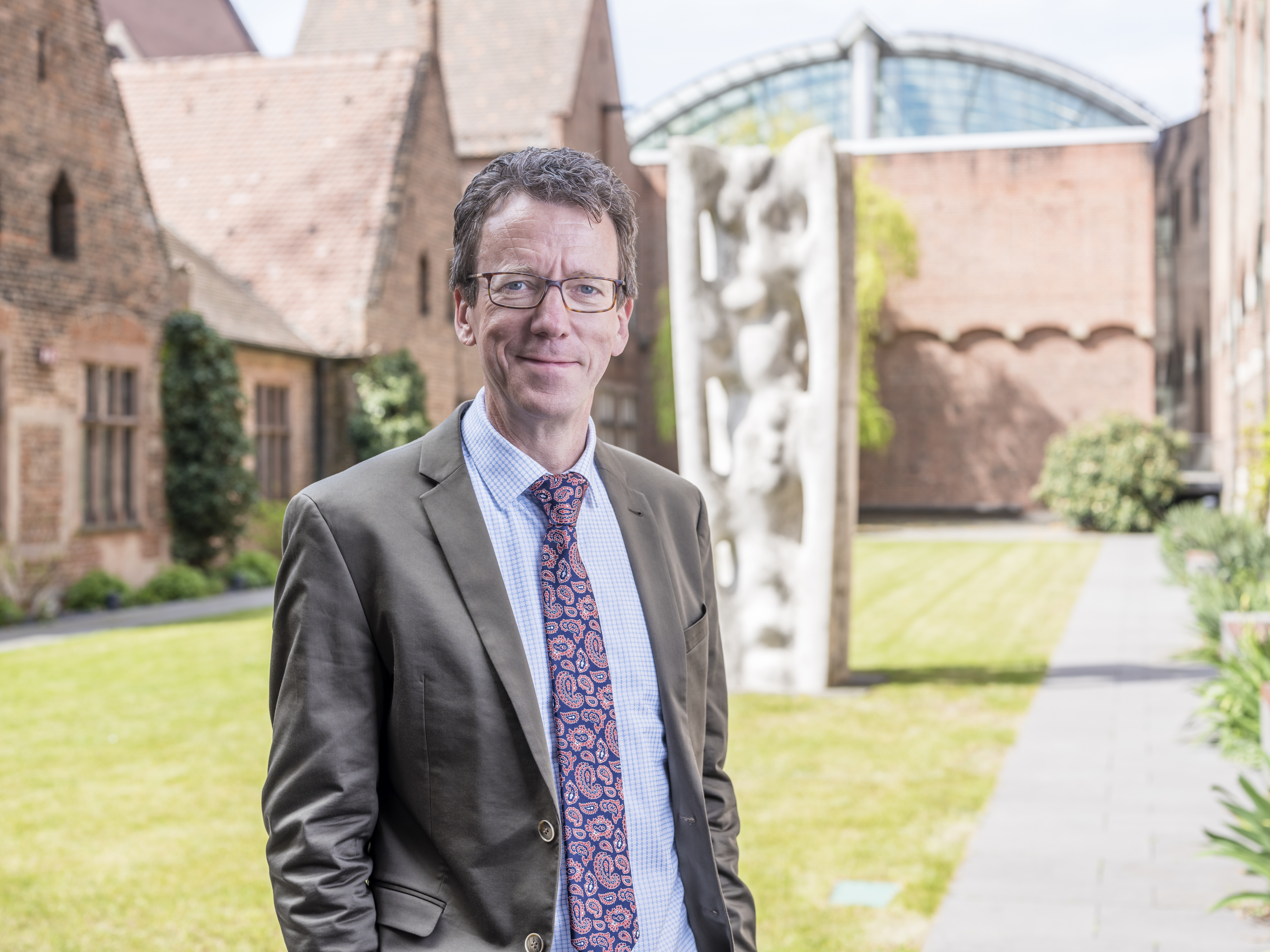 Portrait Prof. Dr. Daniel Hess im kleinen Klosterhof des Germanischen Nationalmuseums, Nürnberg 2019.